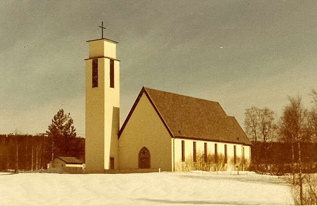 Hernes kapell